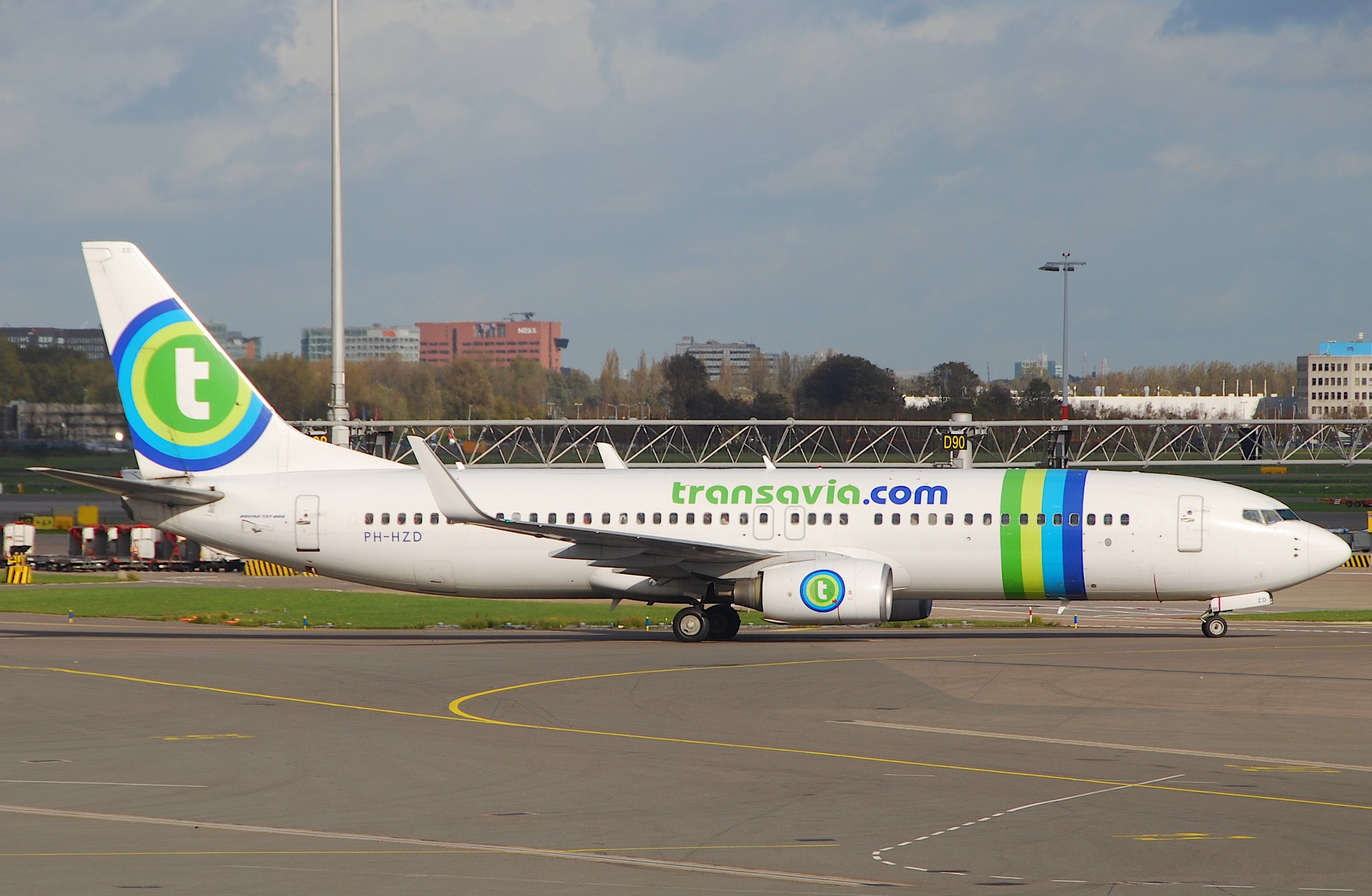 Transavia Boeing 737-800; PH-HZD@AMS;18.10.2011/627cq